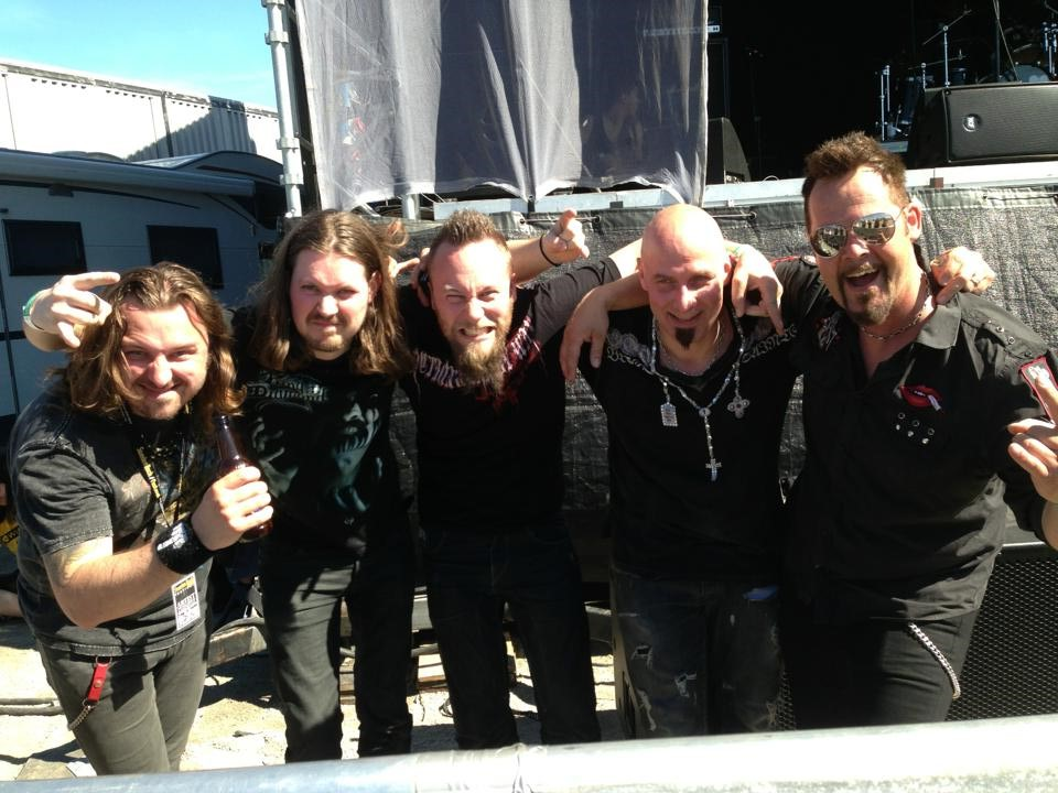 Days Of Jupiter efter spelning på Sweden Rock 2013